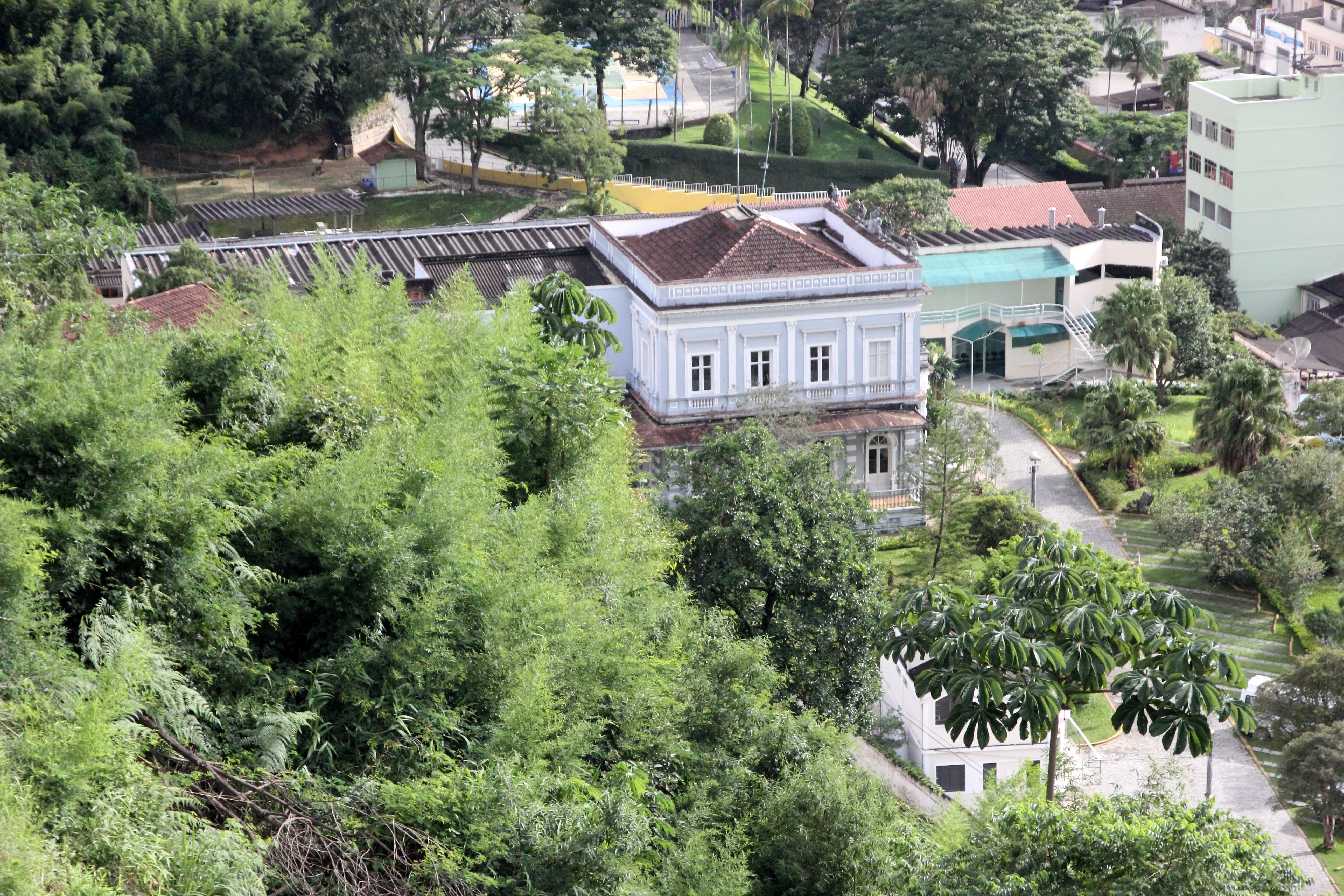 Faculdade de Odontologia de Nova Friburgo